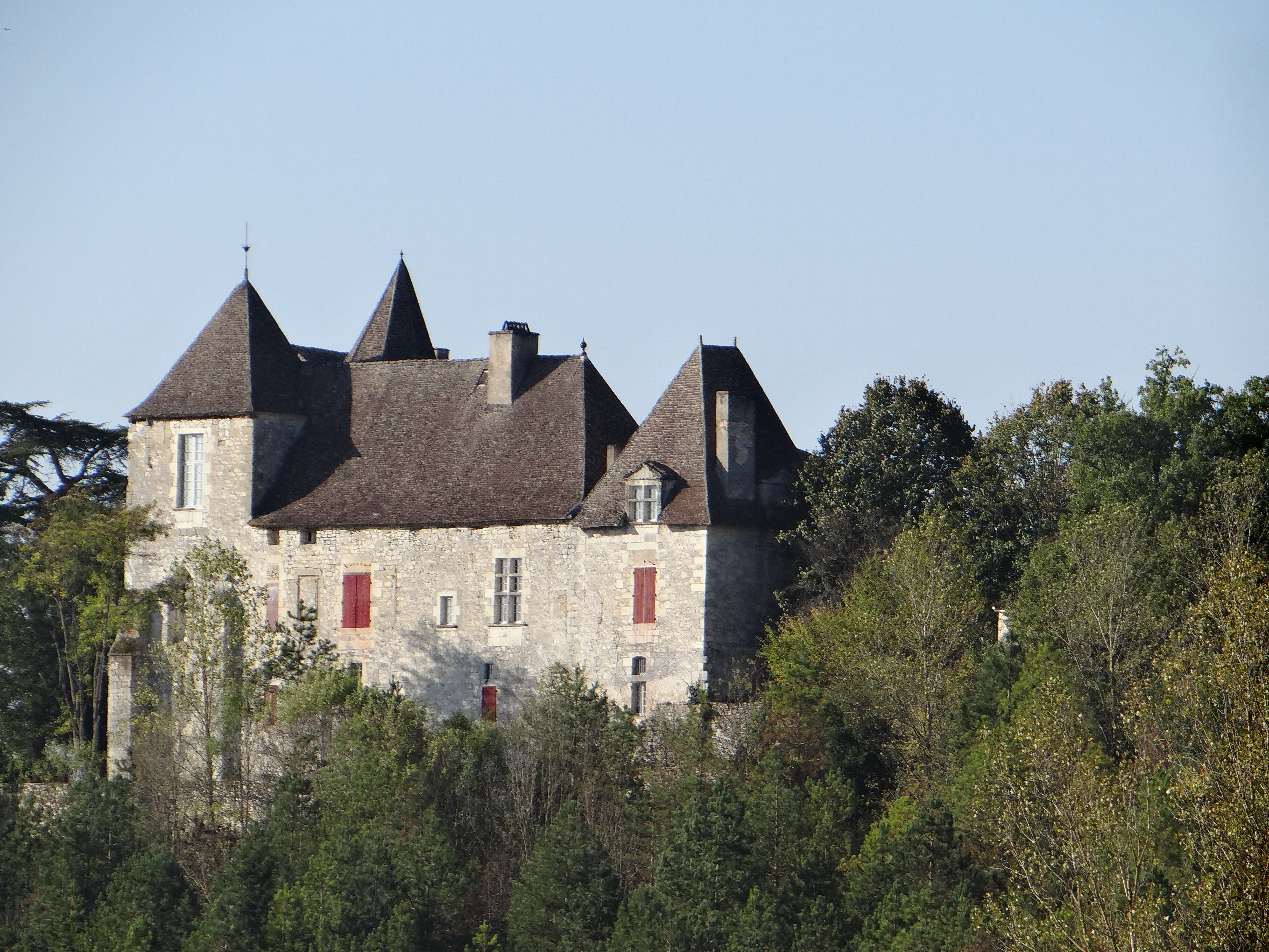 Monflanquin - Château de Roquefère